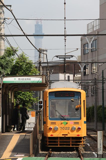 都電荒川線と東京スカイツリー（荒川区役所前）